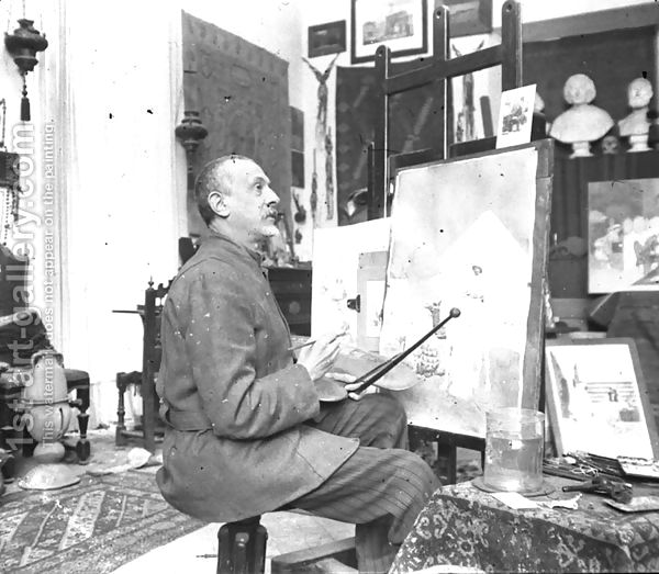 Giulio Rosati (1857 – 1917) - Italian painter